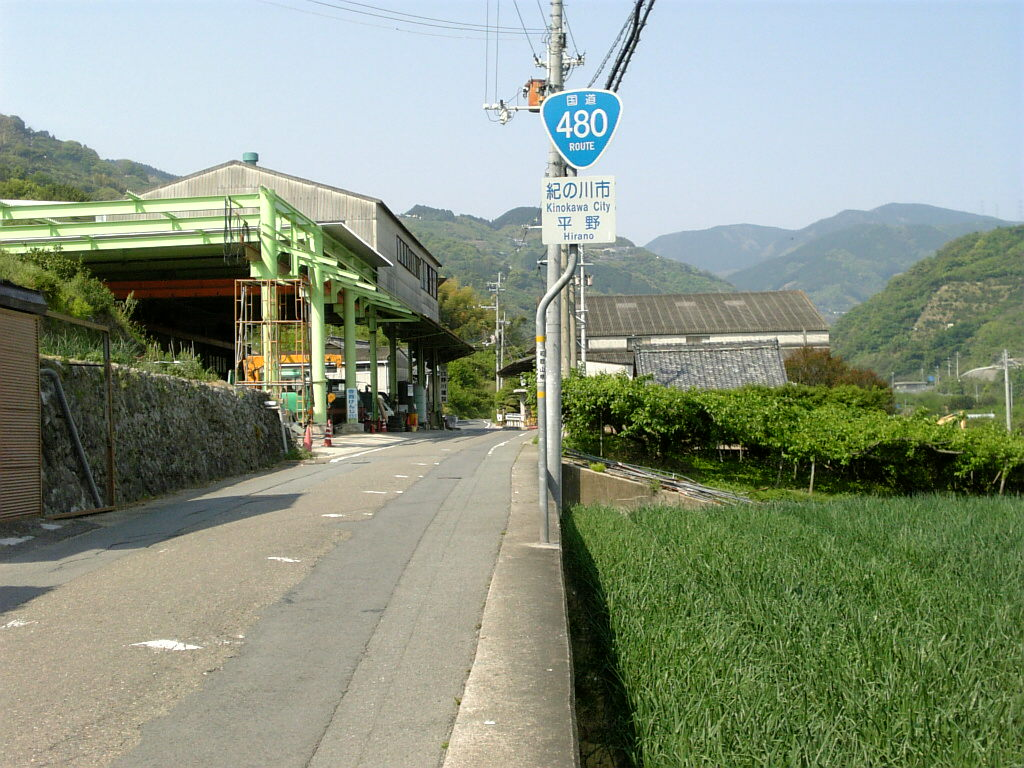 国道480号線（和歌山県紀の川市平野）